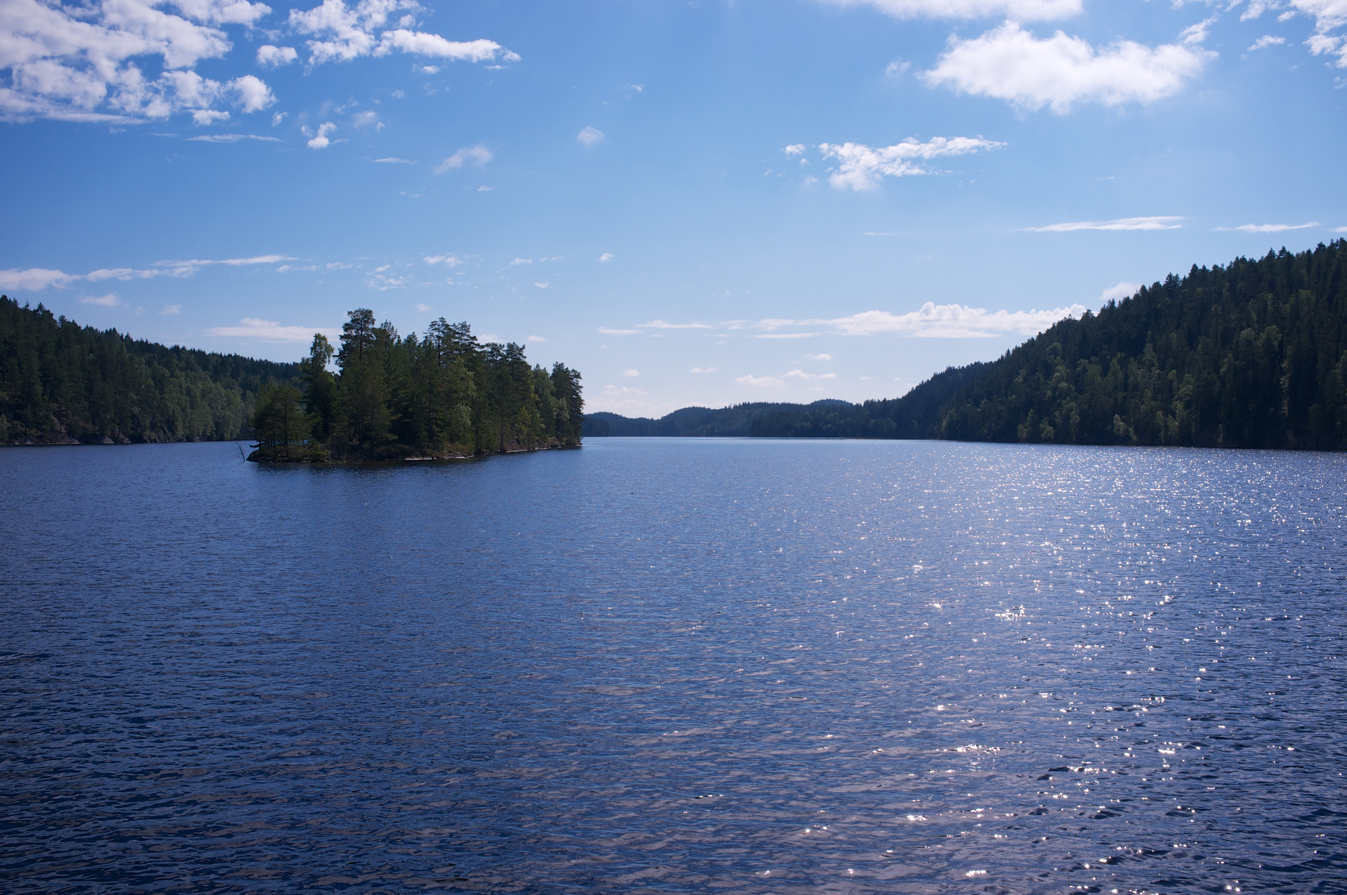 Fra Nord-Elvåga, på grensen mellom Oslo og Lørenskog.